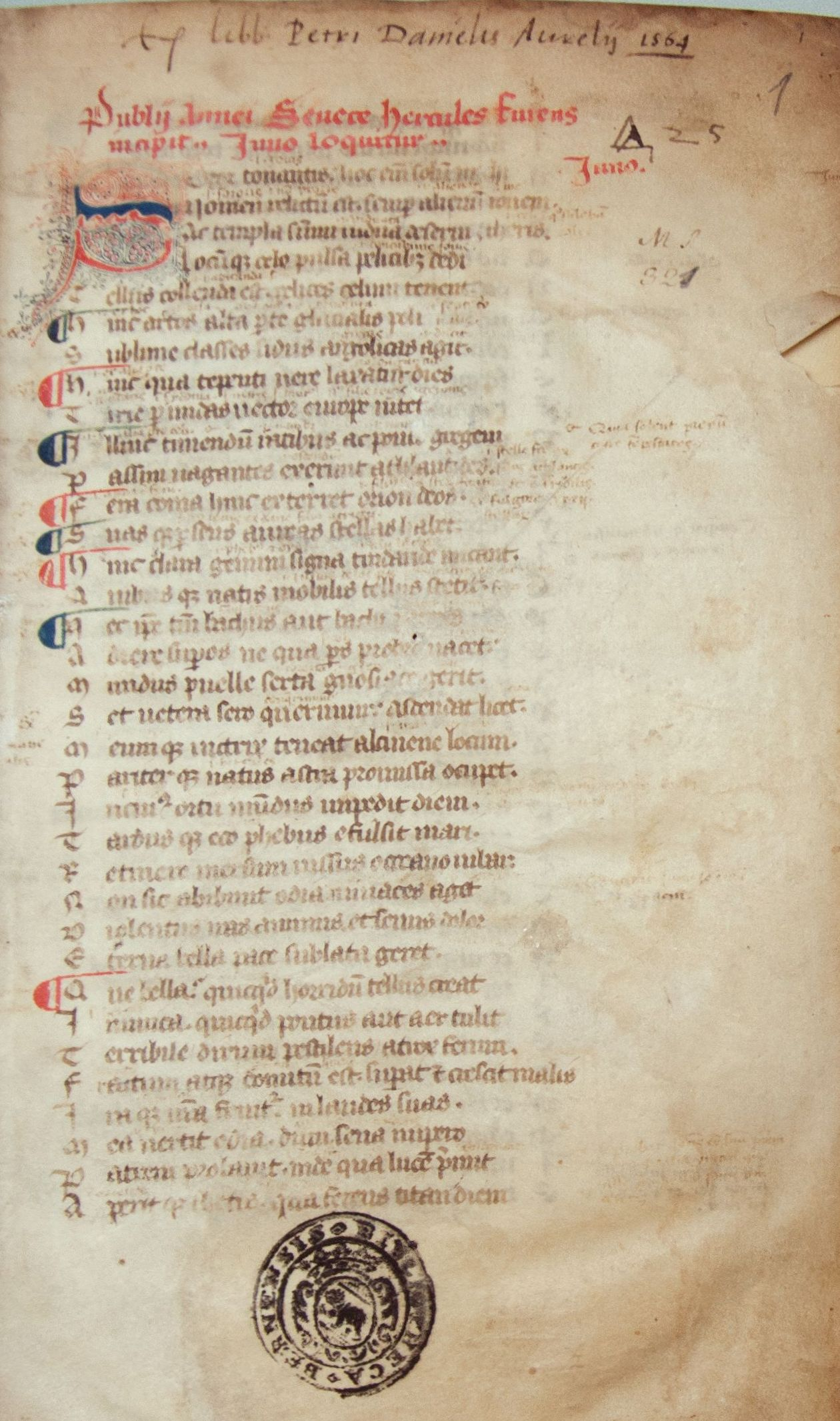 Titelseite einer mittelalterlichen Handschrift mit dem Exlibris von Pierre Daniel; heute im Besitz der Burgerbibliothek Bern.